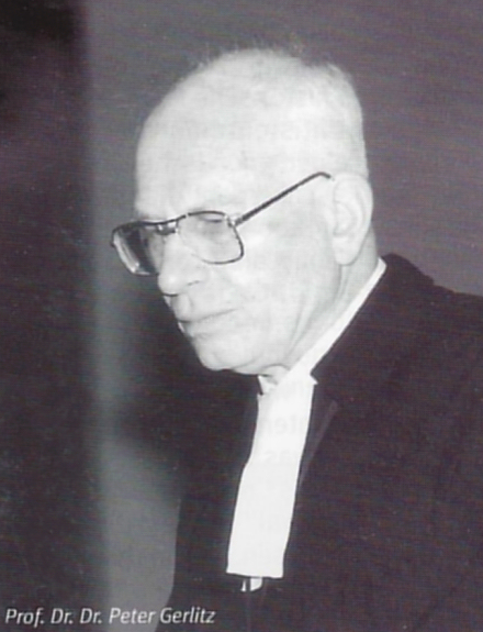 Porträtfotografie von Peter Gerlitz